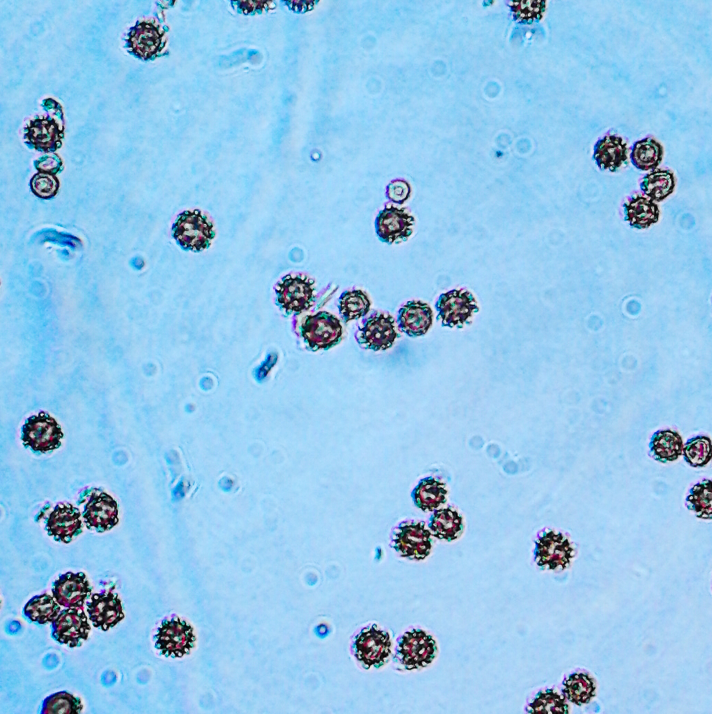 Geastrum pectinatum spores